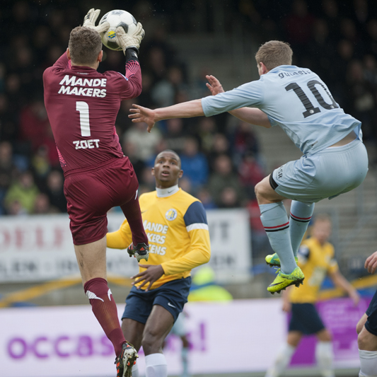 Keeper RKC Waalwijk, in de wedstrijd RKC-Feyenoor